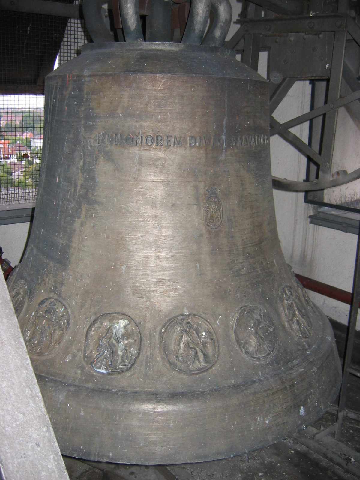 Salvatorglocke von St. Willibald in München-Laim.